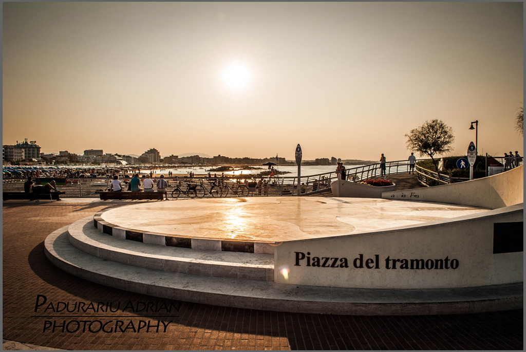 Piazza del Tramonto